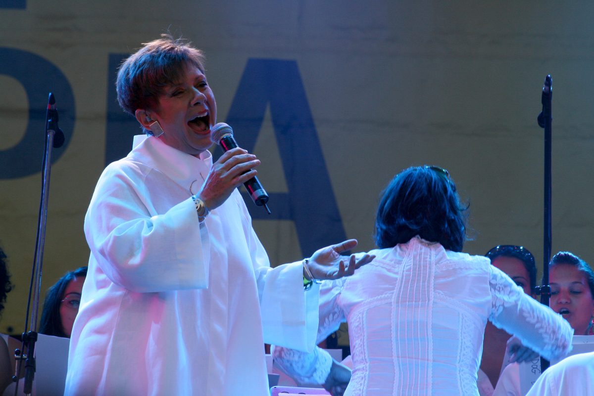 Klári Katona performing